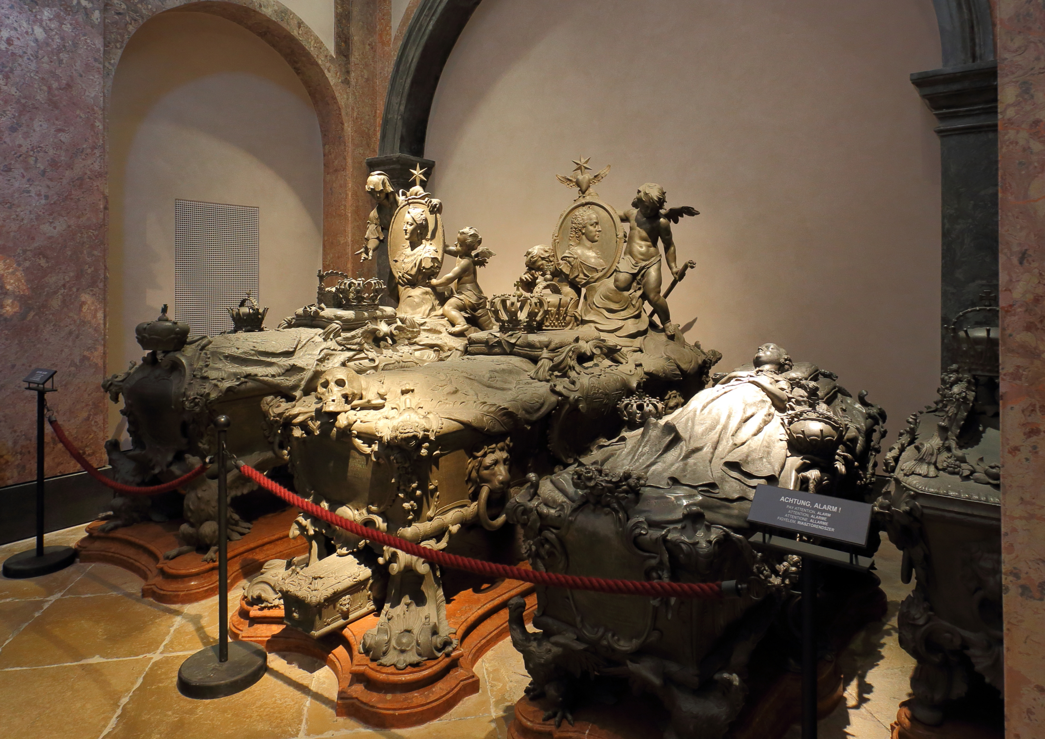 Westseite der Maria-Theresia-Gruft in der Kapuzinergruft, Österreichs größte Gruft in Wien. Insgesamt sind an der westseitigen Wand 6 Sarkophage aufgestellt. Der in der Mitte (mit dem Totenkopf) ist der von der Isabella von Bourbon-Parma, Kronprinzessin und erste Gemahlin von Joseph II.